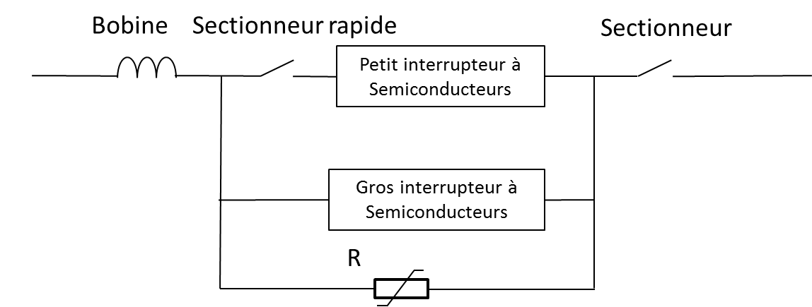 Schéma de principe du disjoncteur HVDC hybride d'ABB présenté en 2011.